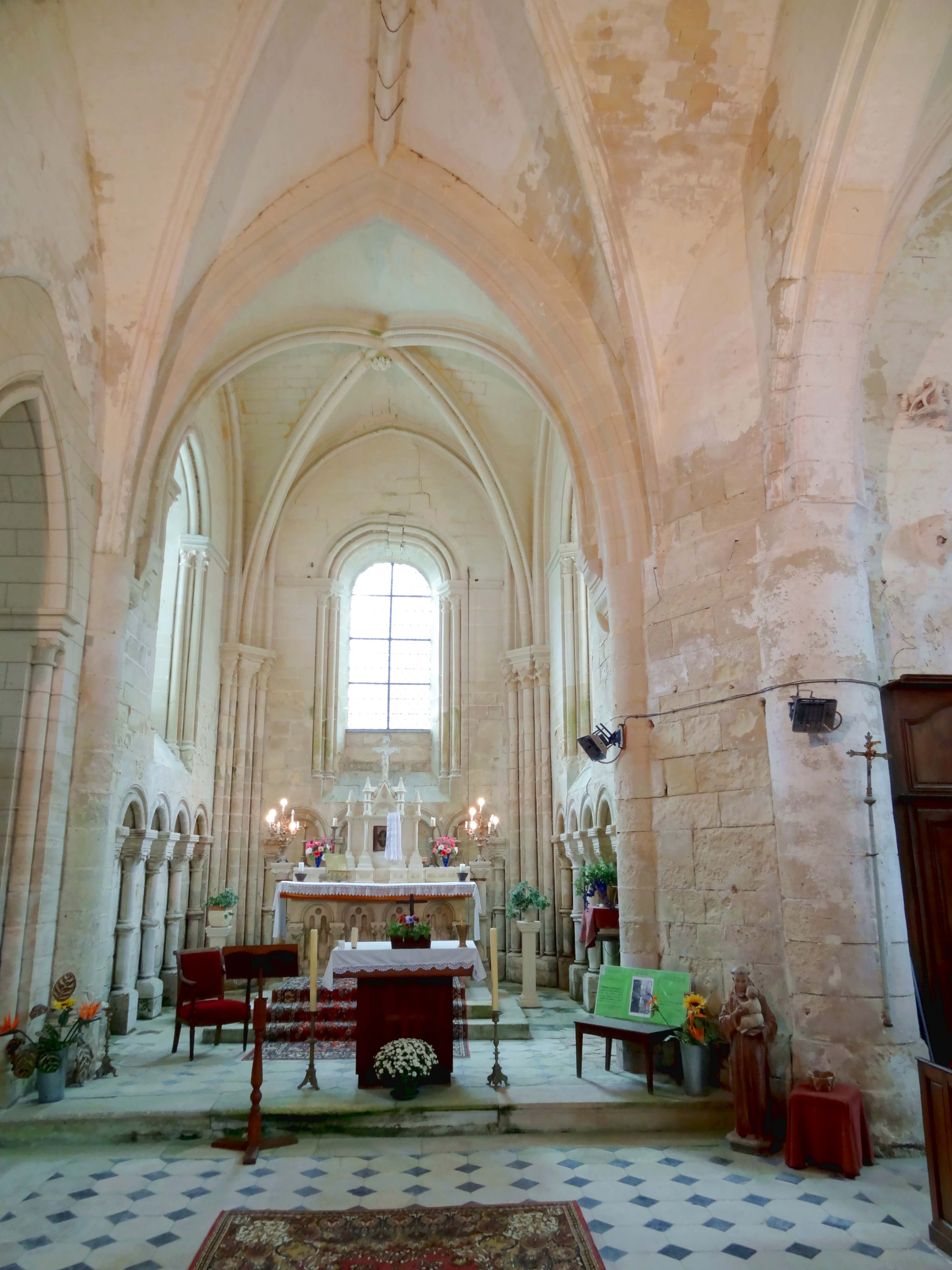 Intérieur de l'église - voir titre.